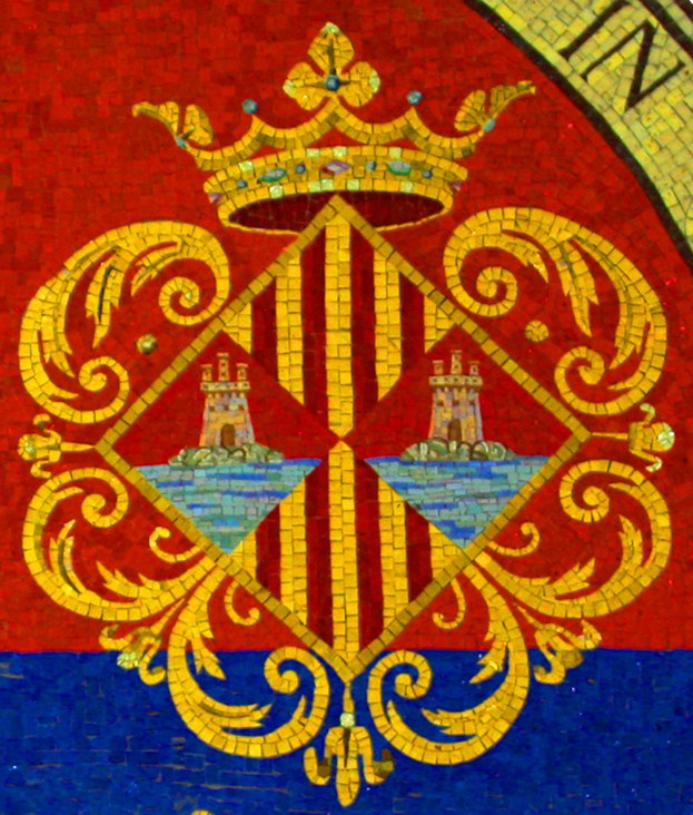 Stemma di Cagliari nella Corona d'Aragona dal gonfalone dell'università, 1606 riproduzione a mosaico